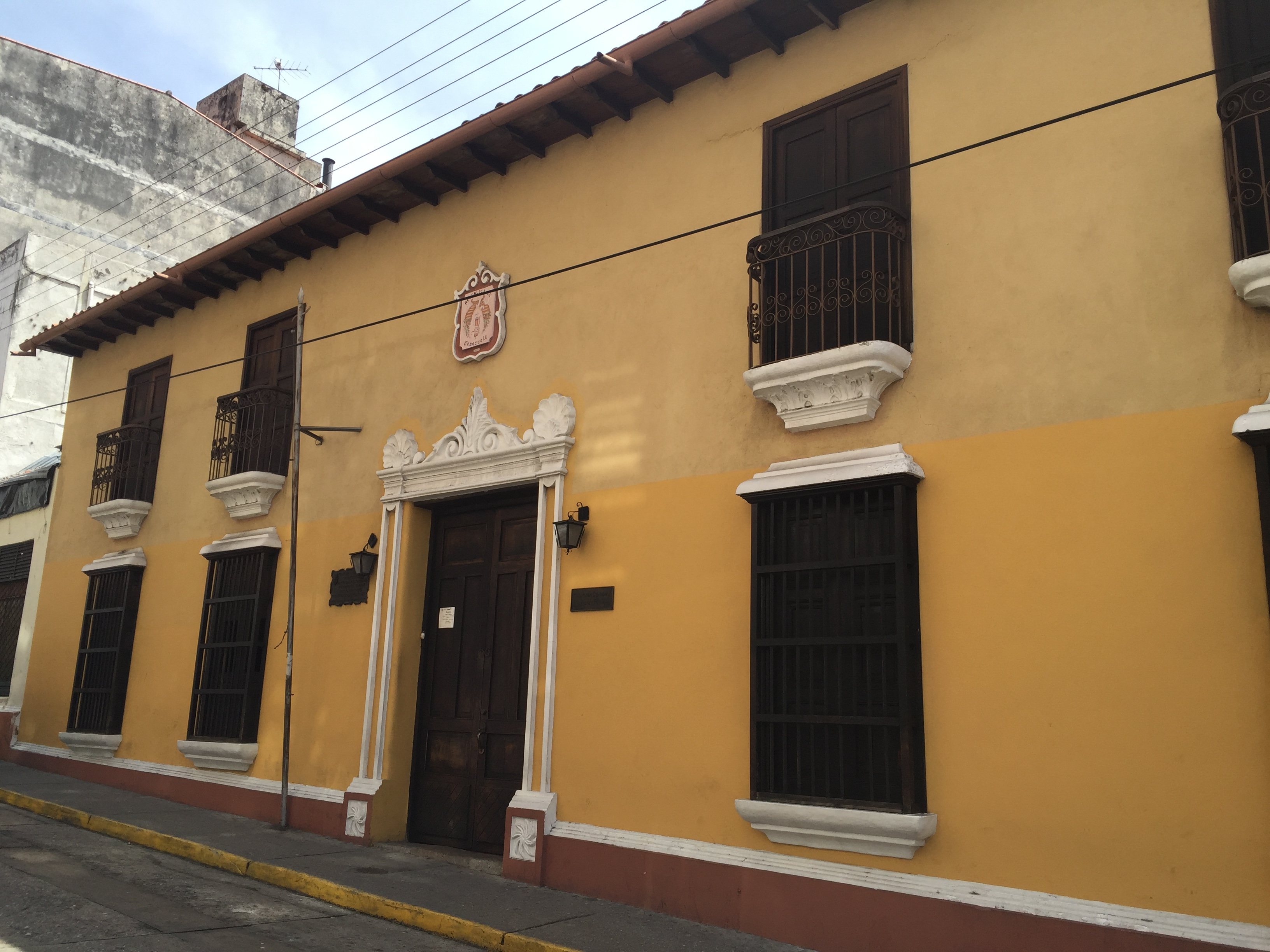 Casa de los Gobernadores, actual sede de la Academia de Mérida. Mérida, Venezuela.